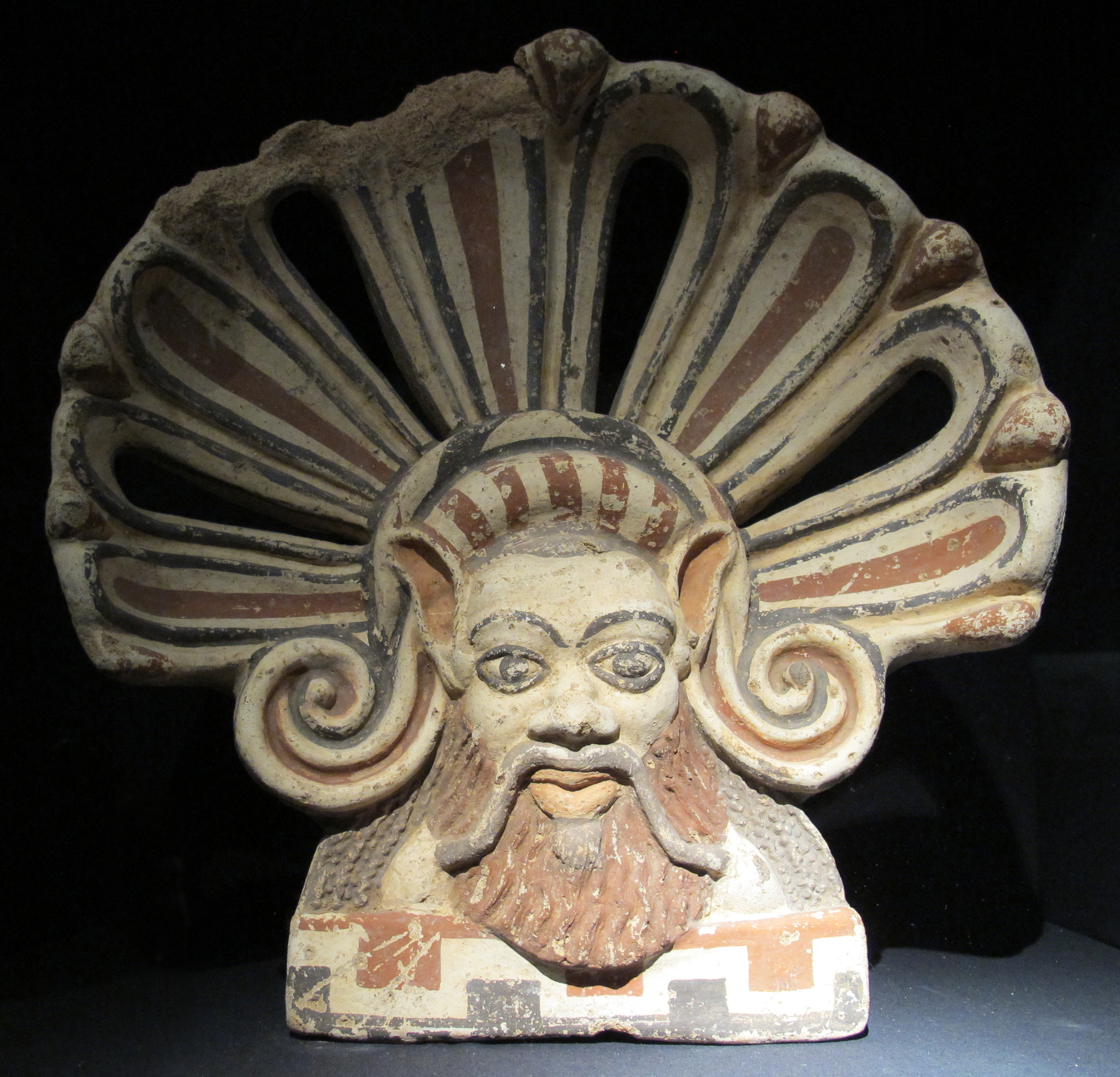 Monsters Exhibition (Palazzo Massimo, Rome, 2014)